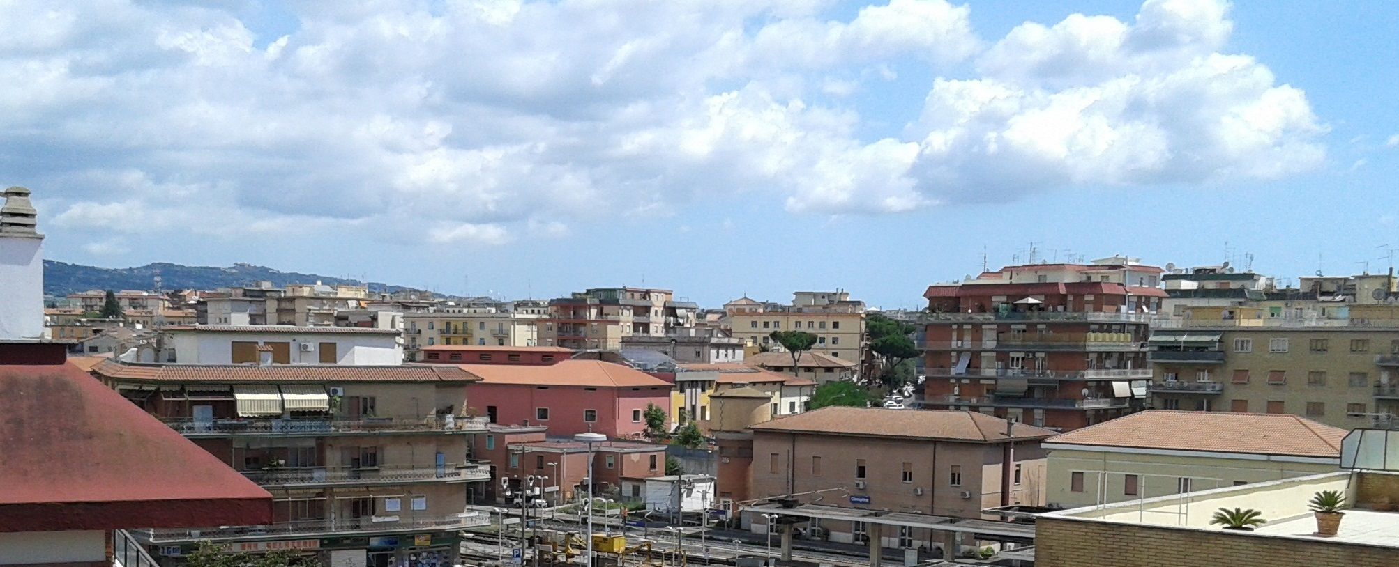 Panorama di Ciampino da piazza John Fitzgerald Kennedy. In basso al centro: la principale stazione ferroviaria della città.